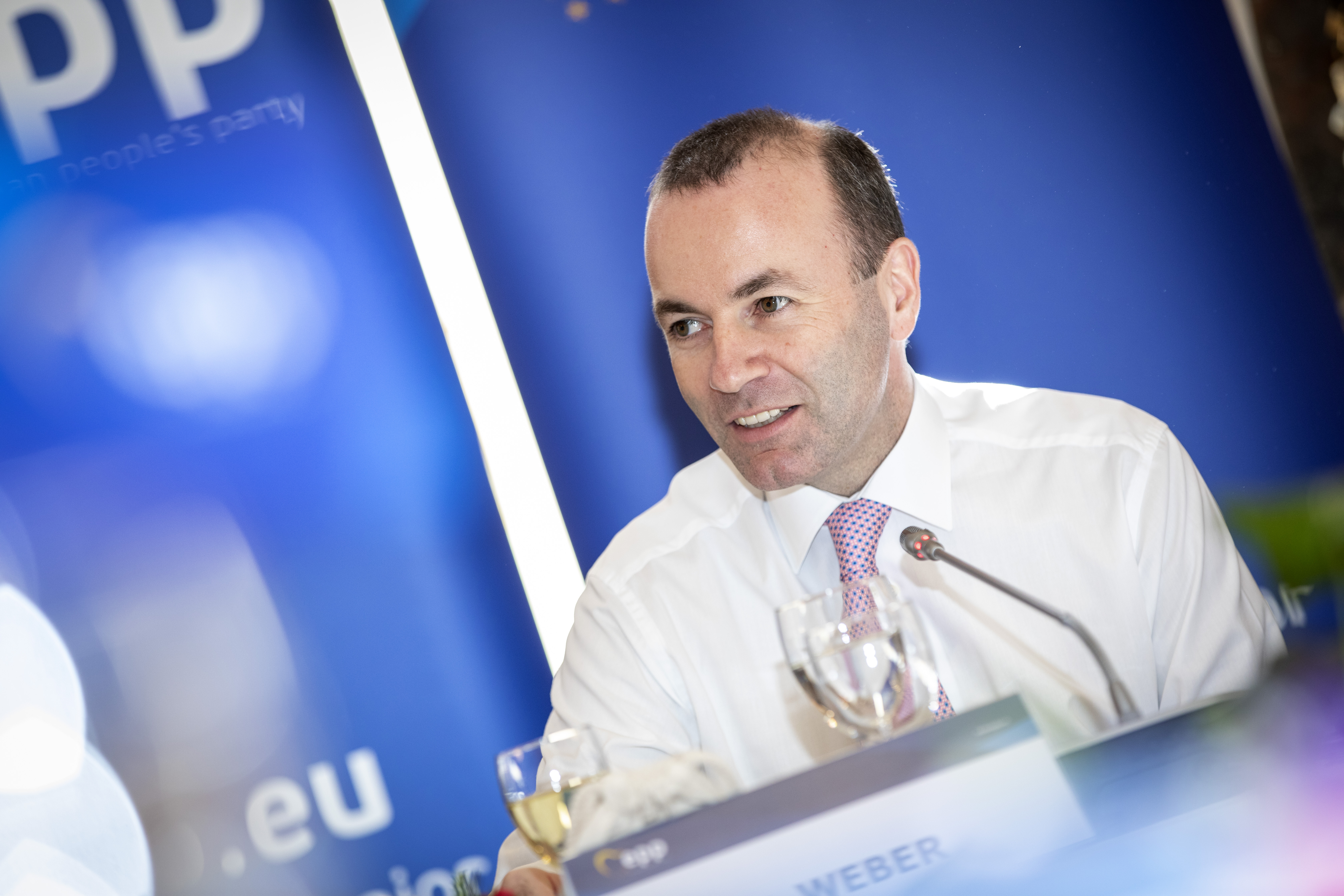 EPP Summit Brussels, March 2019